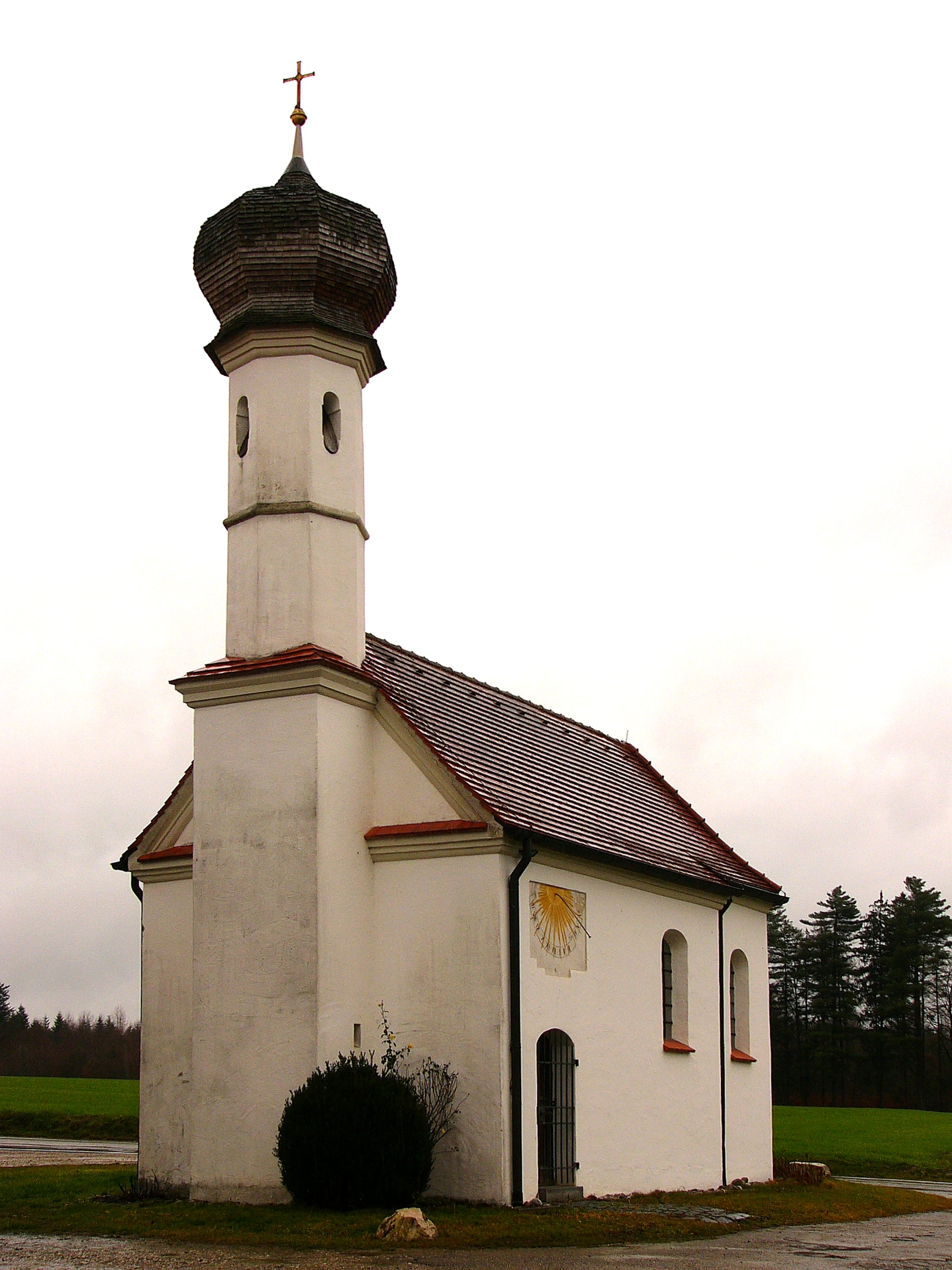 Katholische Filialkirche St. Michael; einschiffig mit eingezogenem, dreiseitig geschlossenem Chor, Westturm mit Oktogon und Zwiebelhaube, 1614 erbaut, 1709/10 durch Georg Glonner barockisiert; mit Ausstattung. This is a photograph of an architectural monument.